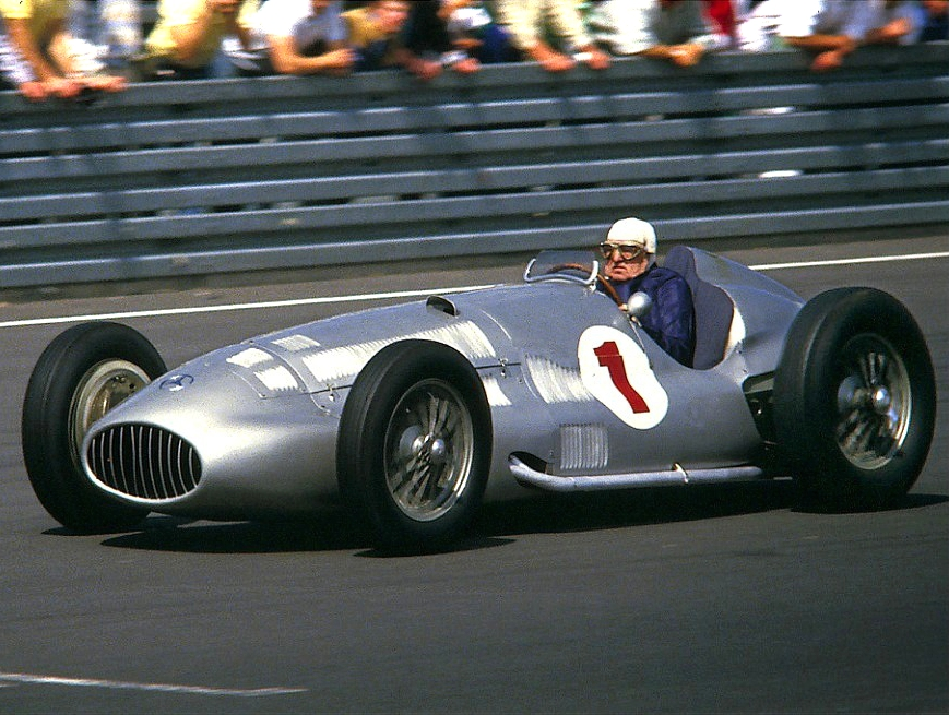 Hermann Lang 1986 im Mercedes W 154 beim Oldtimer-GP des AVD auf dem Nürburgring, Zielgerade